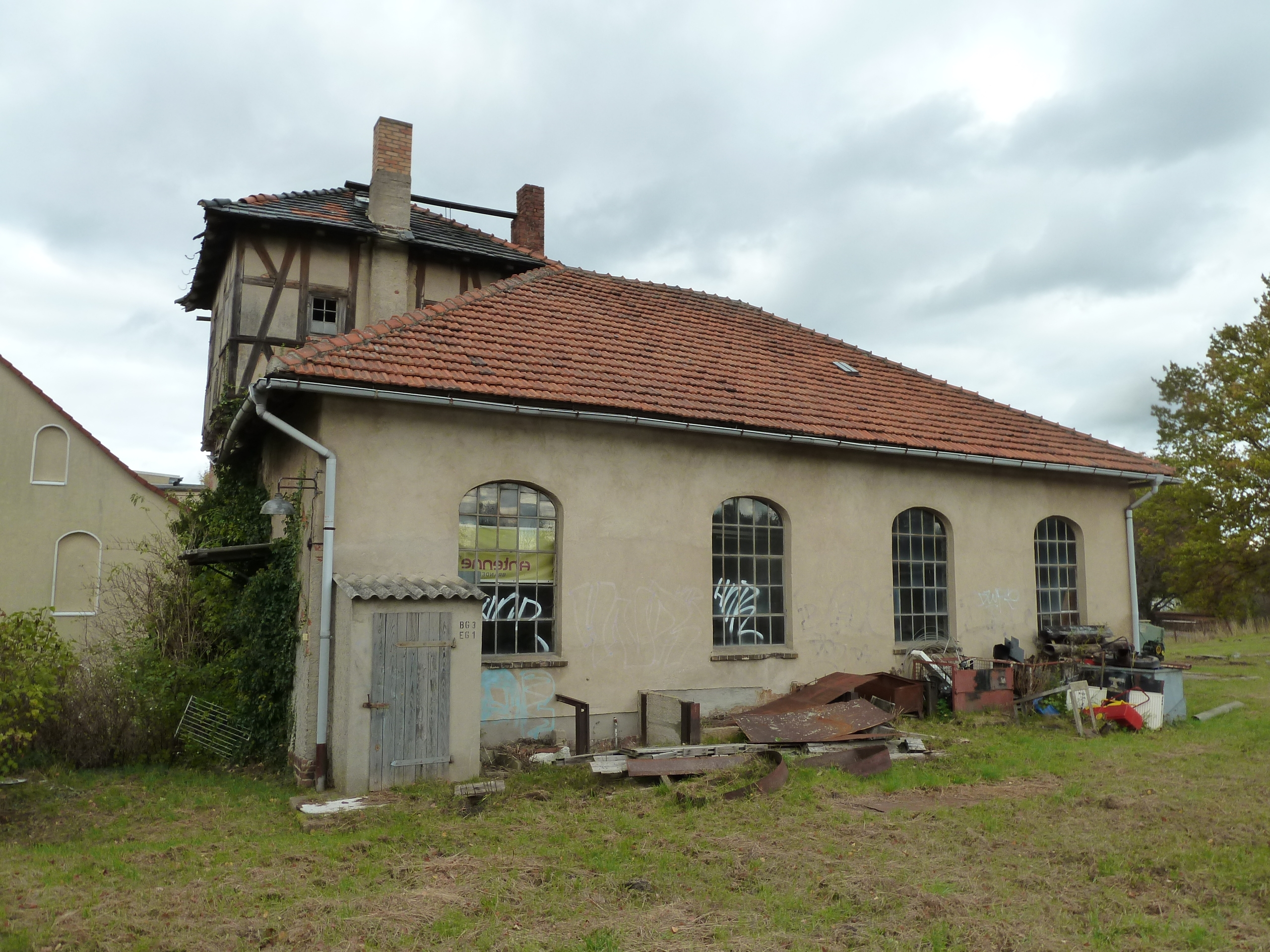 Bahnhof Pritzwalk, ehemaliger Lokschuppen der Schmalspurbahn, denkmalgeschützt.